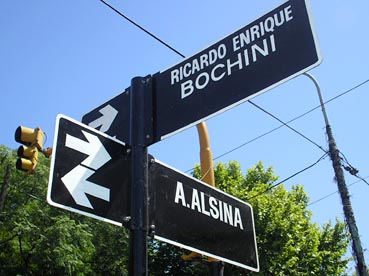 El proyecto de Cantero realizado, la nueva calle ricardo Enrique Bochini